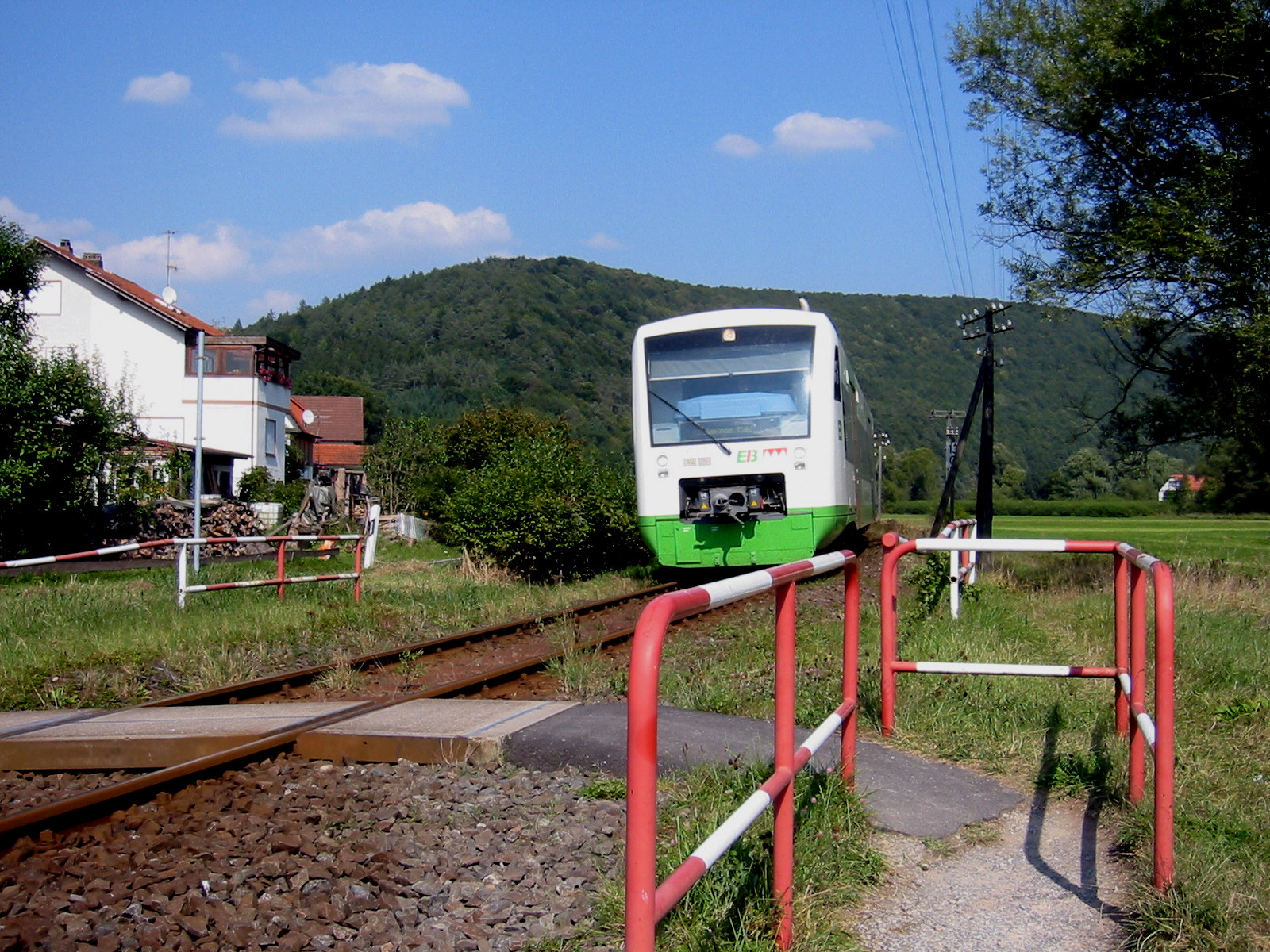 UnterfrankenShuttle der Erfurter Bahn (EIB) in Gräfendorf